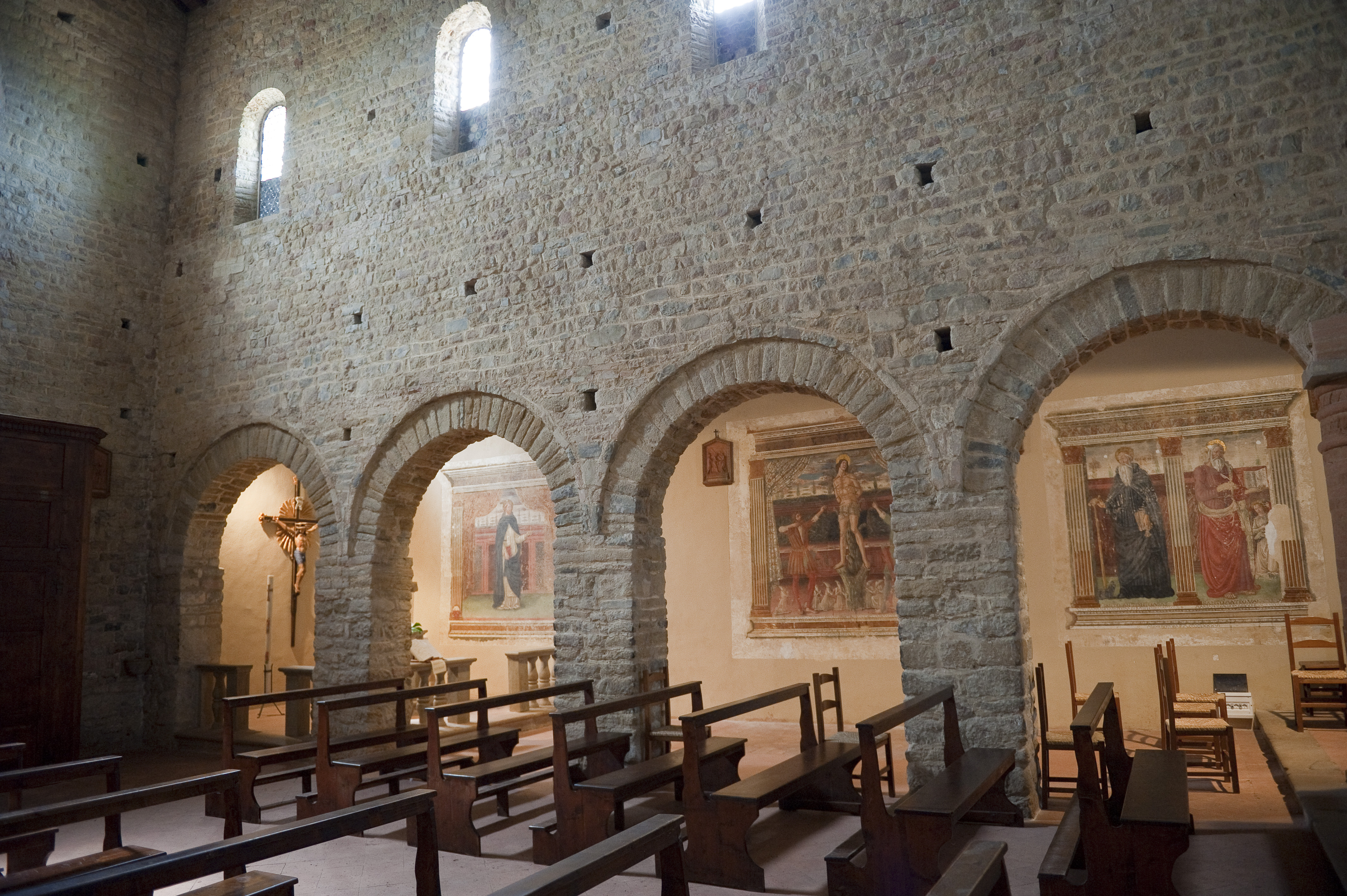 Veduta dei quattro pilastri protoromanici (XI secolo) della pieve di Sant'Appiano, Barberino Val d'Elsa